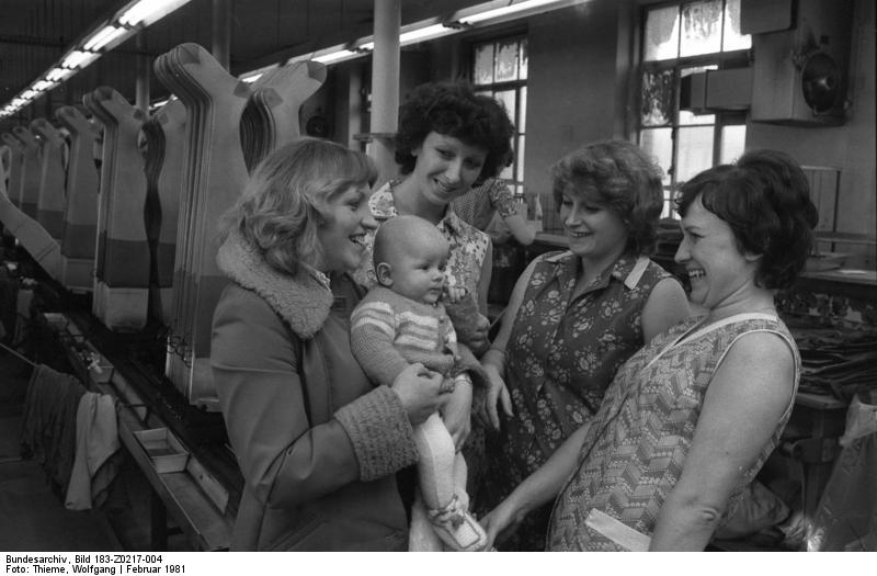 Thalheim, Besuch im Betrieb ADN-ZB/Thieme/17.2.81/Bez. Karl-Marx-Stadt/ Kombinat ESDA/ Zu Besuch in ihrer Brigade ist Monika Herfuhrt mit ihrem Sohn André gekommen. Große Freude bei den Frauen aus der Fixiererei des Werkes Thalheim des ESDA-Kombinats. Nach dem "Babyjahr" wird die junge Mutti wieder bei ihnen arbeiten. Bei einem Frauenanteil von fast 75 Prozent sind die vom IX. Prteitag beschlossenen sozialpolitischen Maßnahmen im Kombinat ESDA besonders spürbar.